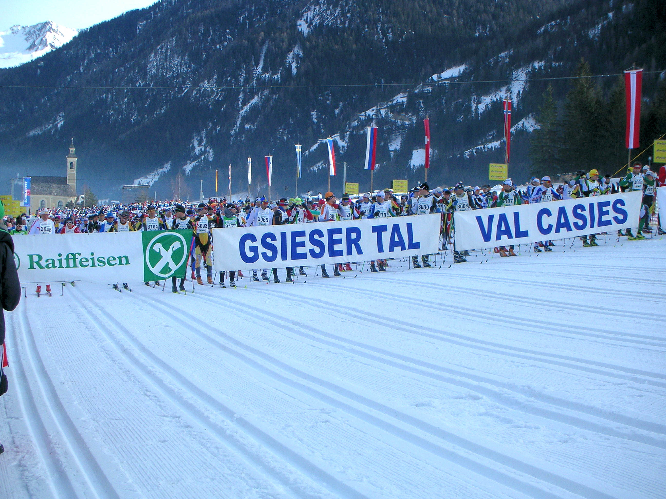 Start des Gsieser Tal-Lauf s2012